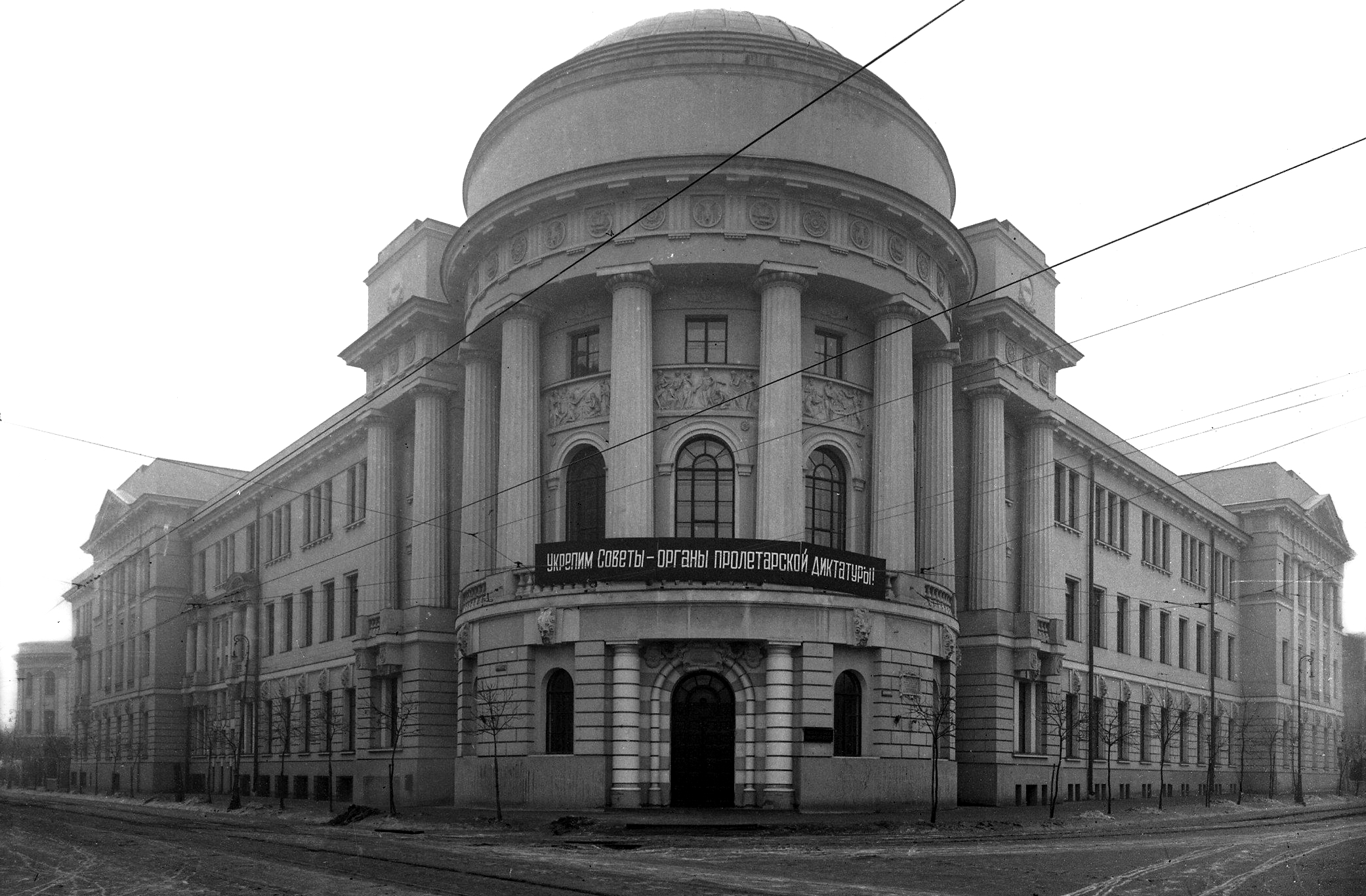 2 Московский государственный университет